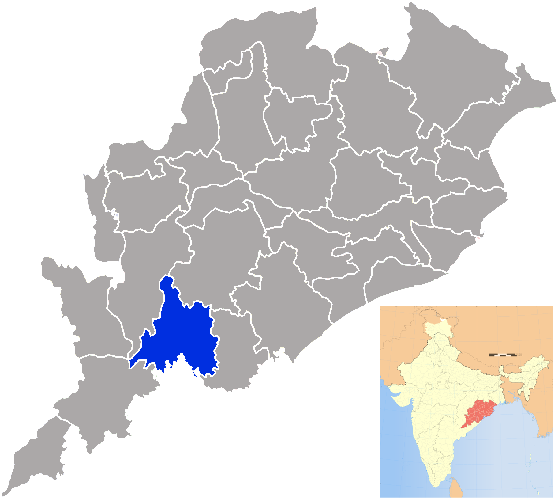 Distrito de Rayagada en Orissa